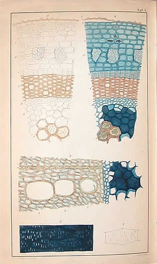 Versuch einer allgemeinen physiologischen Chemie : Bild 1